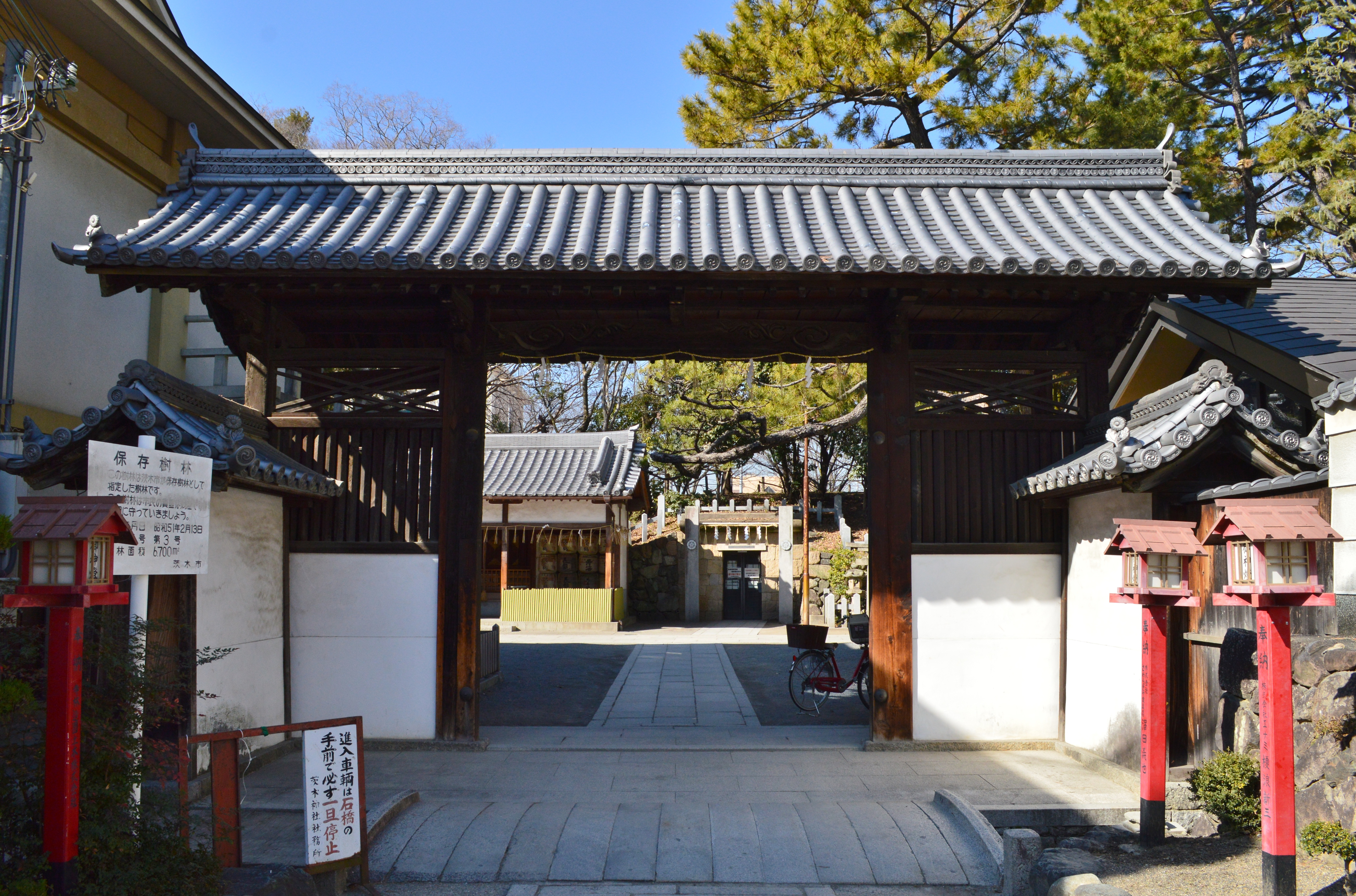 茨木神社 東門 (伝茨木城搦手門)